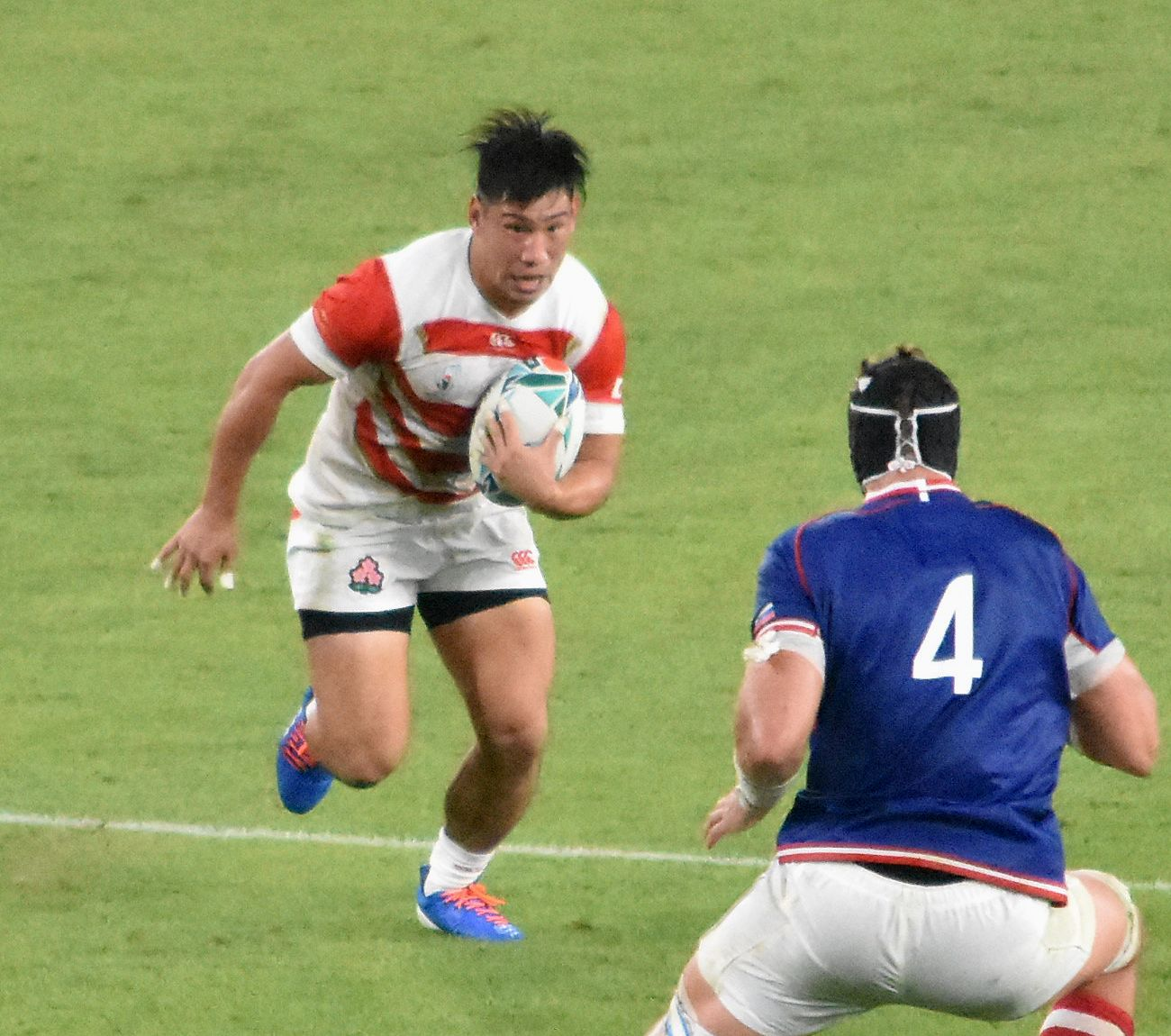 中村 亮土